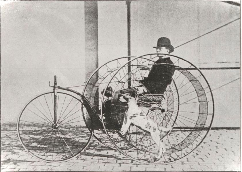 Vélocipède mis en mouvement par deux chiens